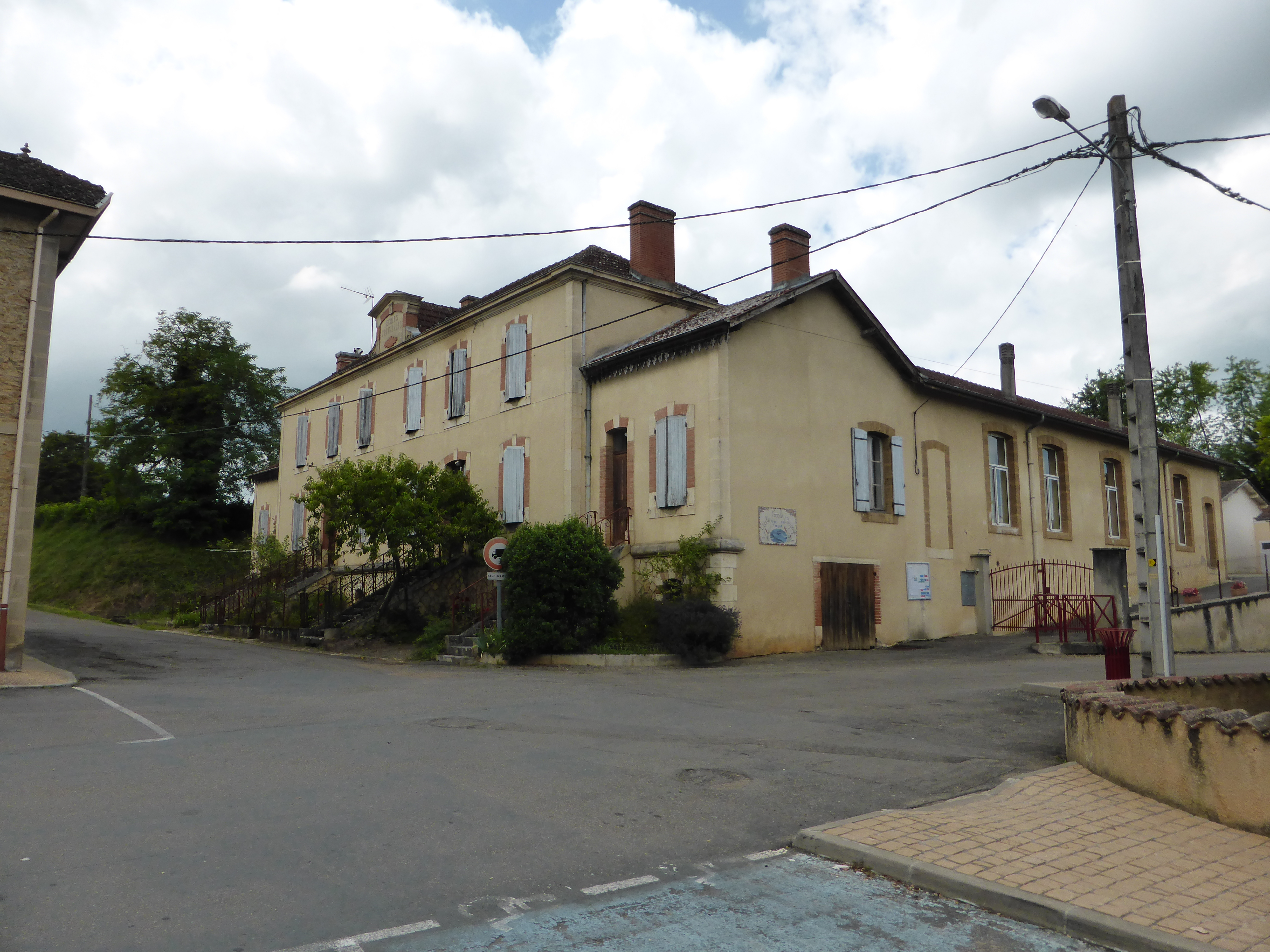 École d'Estang, dans le Gers.